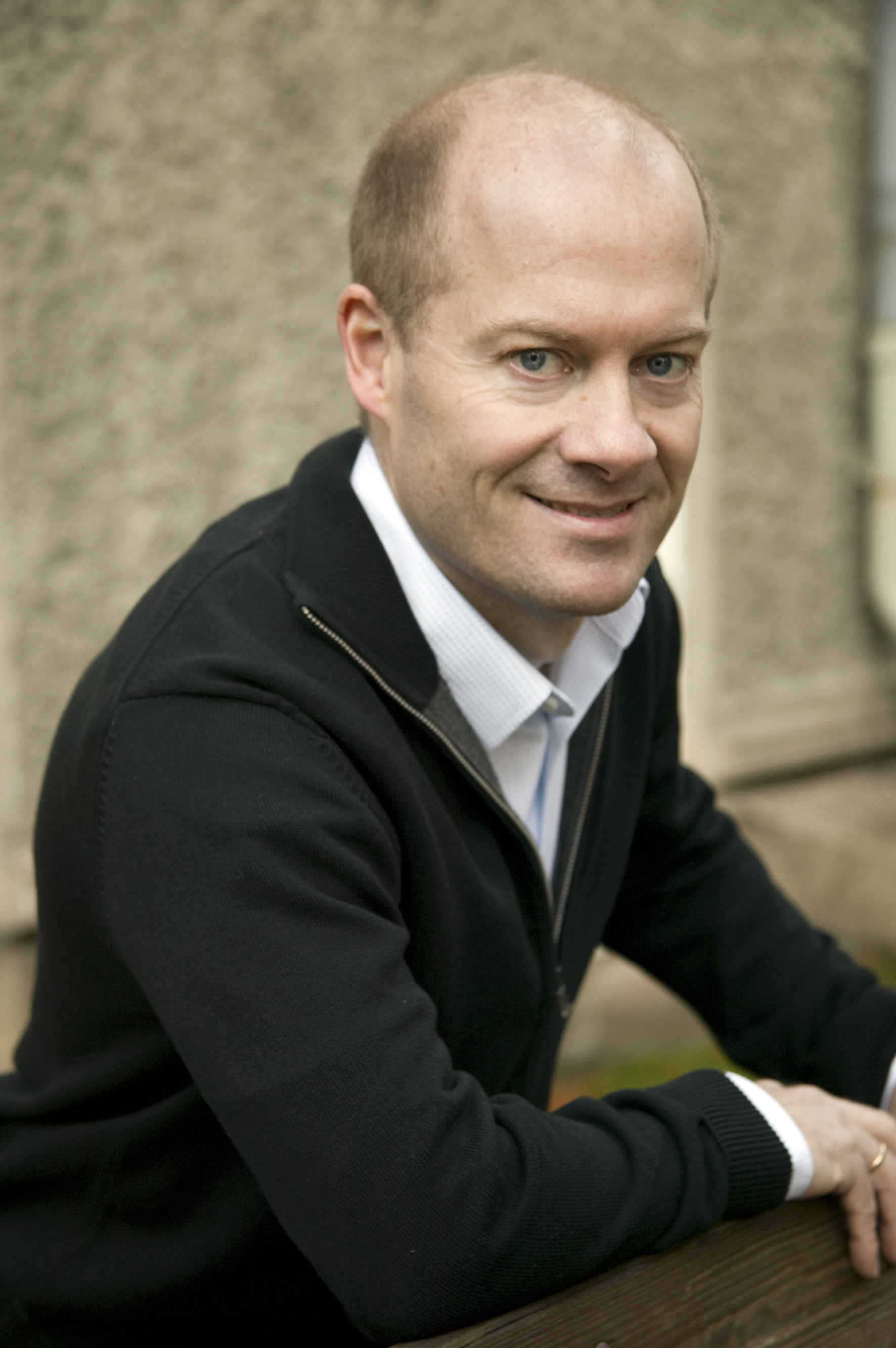 Inge Røinaas Gran (foto: Gry Karin Stimo)